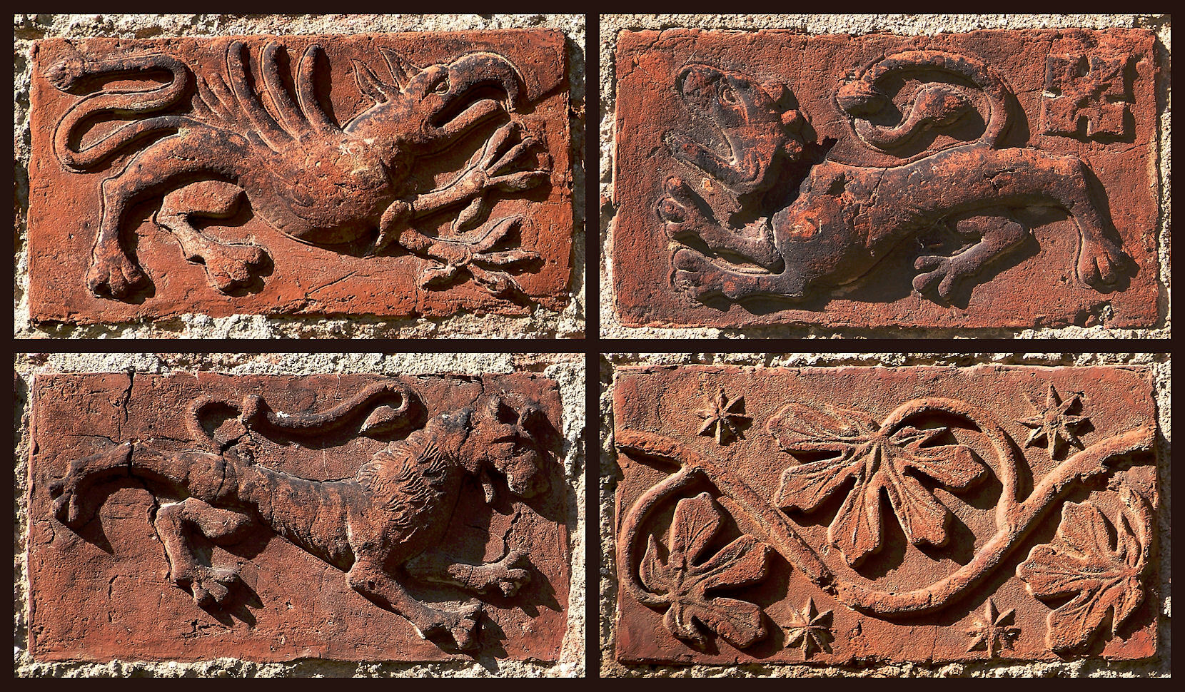 Kirche in Steffenshagen, Details der Backsteinfriese des Chors